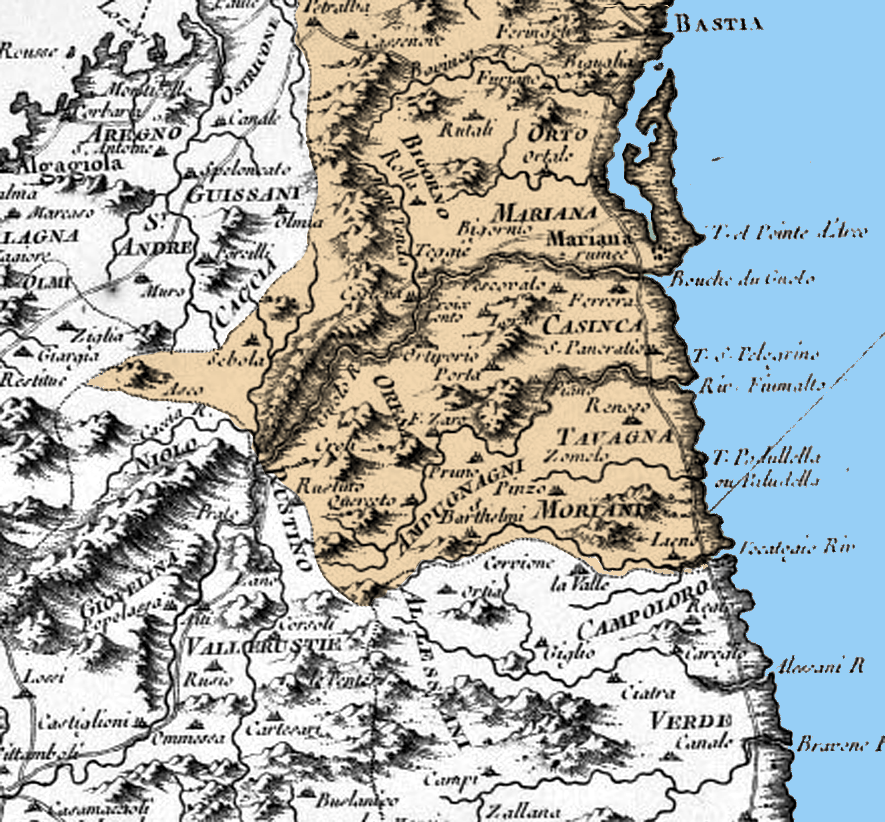 Sud de la Province de Bastia - extrait de la Carte de l'isle de Corse de Jacques-Nicolas Bellin, éditée en 1764